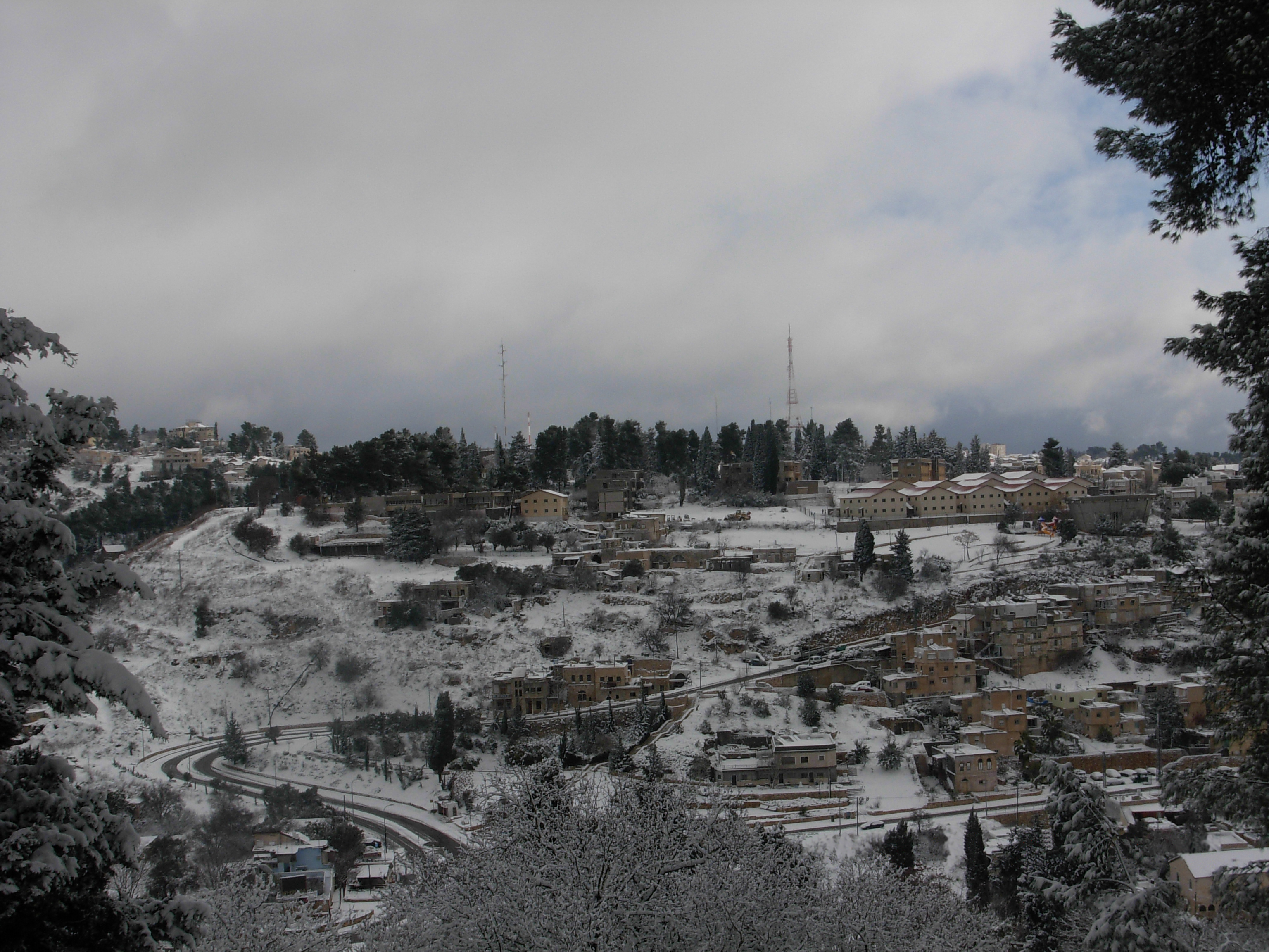 שכונת כנען(צפת) בשלג